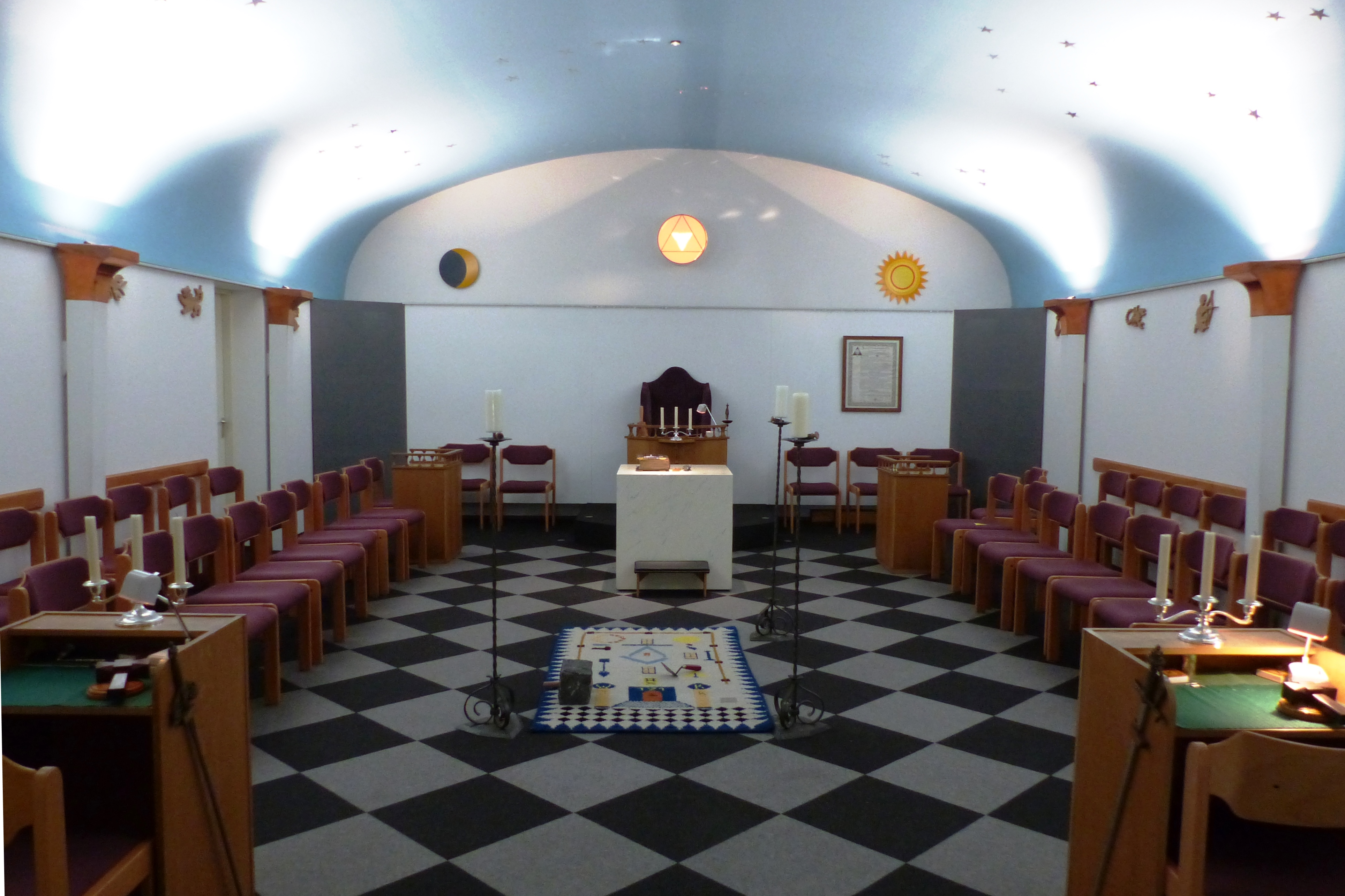 Werkplaats of tempelruimte van de vrijmetselaars De Achterhoek.